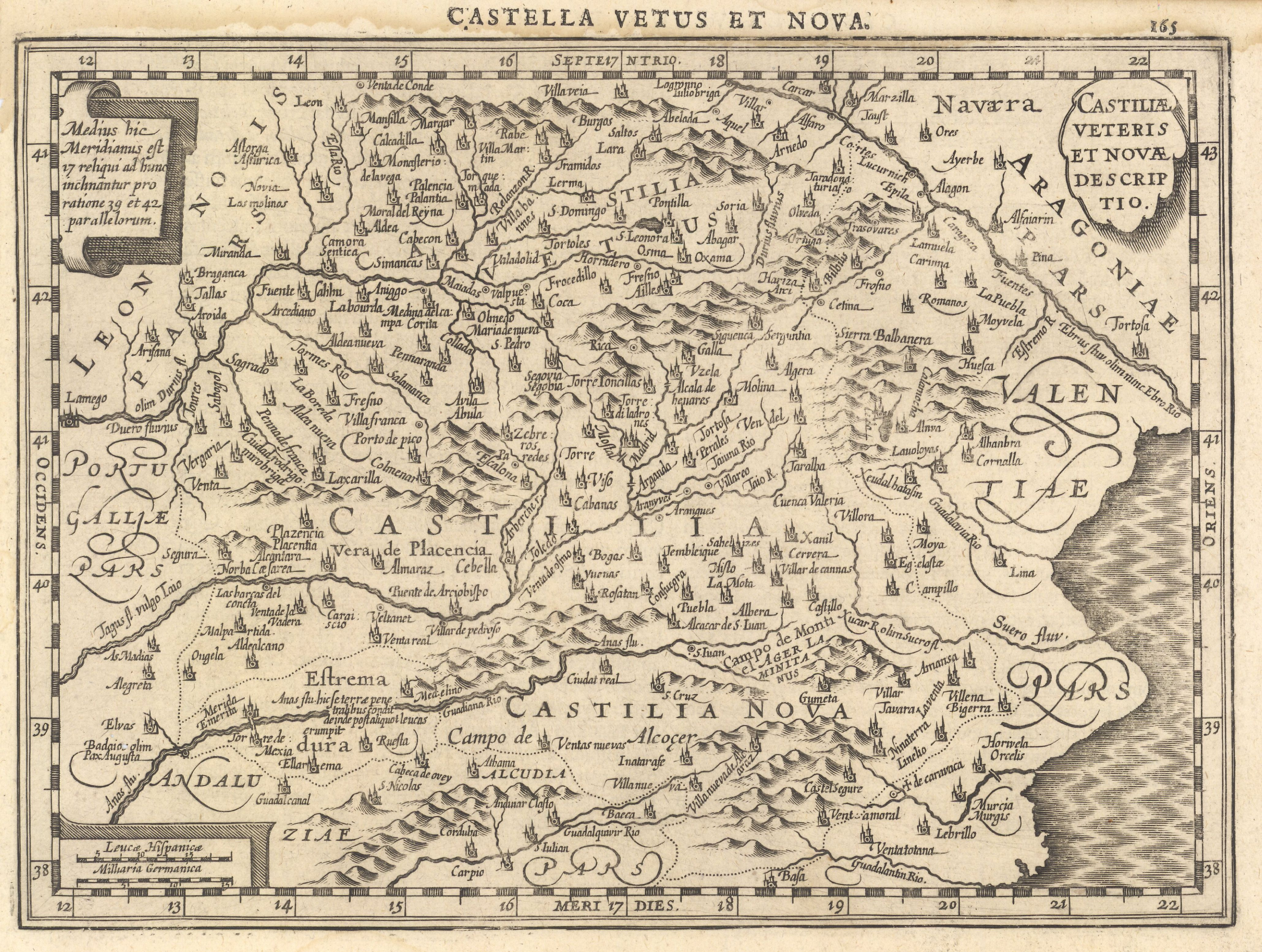 Mapa de Castilla en 1606